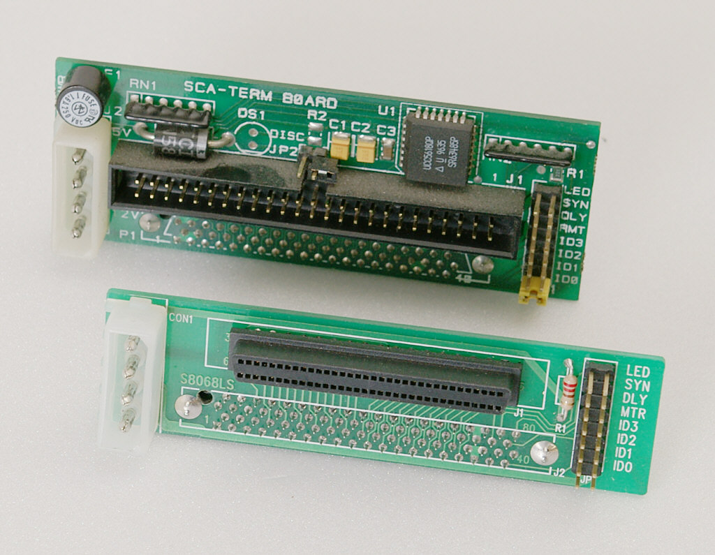 Zwei Adapterplatinen zum Anschluss von SCSI-Festplatten mit SCA-Interface an 50- bzw. 68-polige SCSI-Kabel